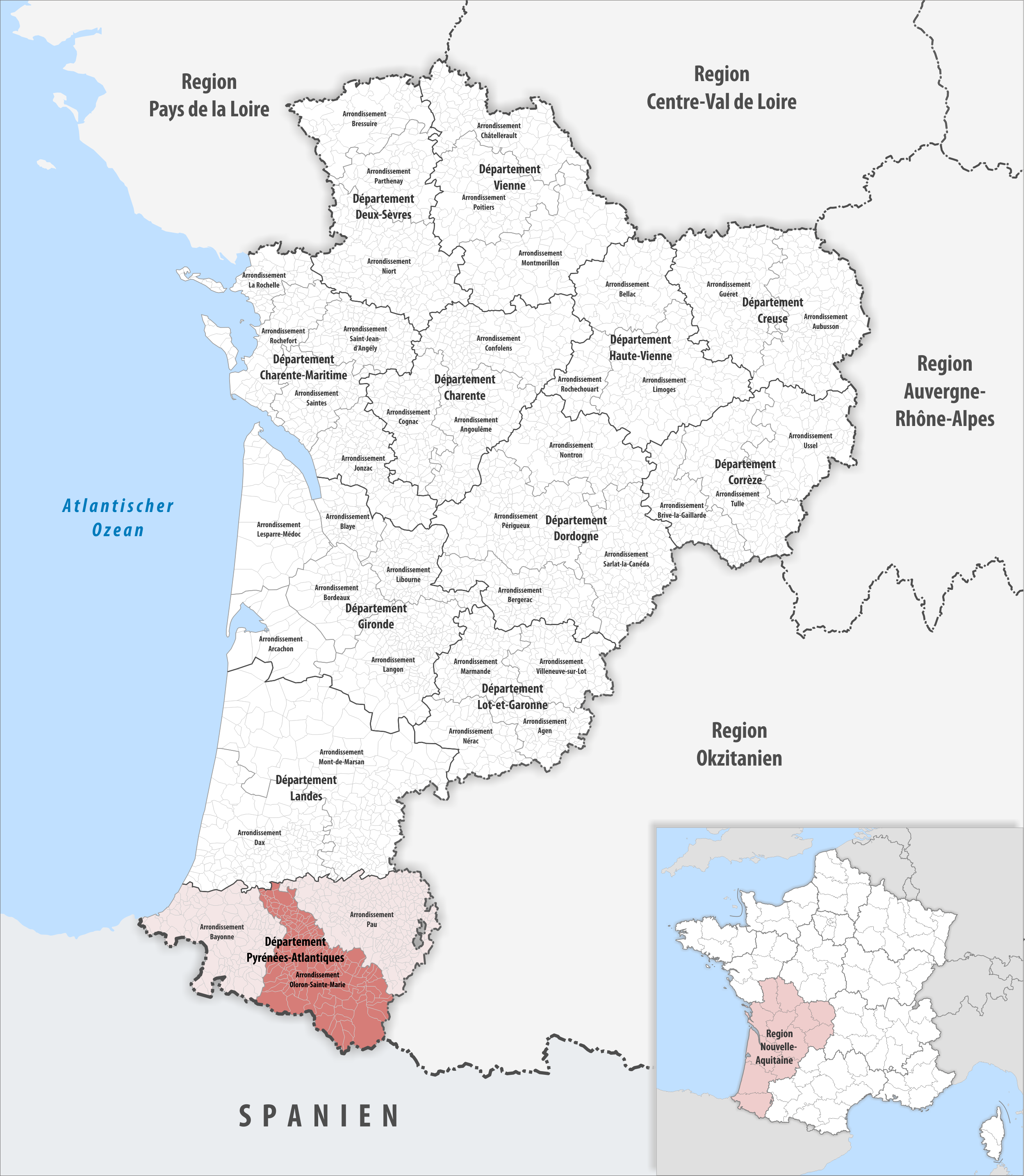 Lage des Arrondissements Oloron-Sainte-Marie